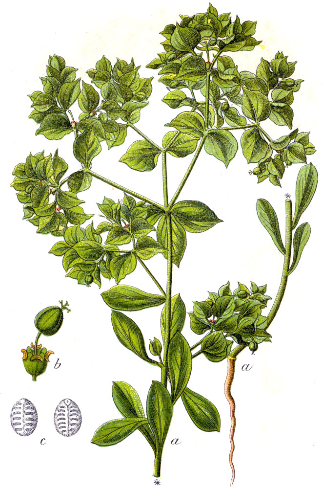 Euphorbia falcata L., nom. cons. prop. Original Caption Sichel-Wolfsmilch, Euphorbia falcata